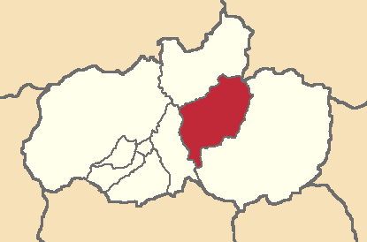 Mapa localizador del cantón en Tungurahua, Ecuador